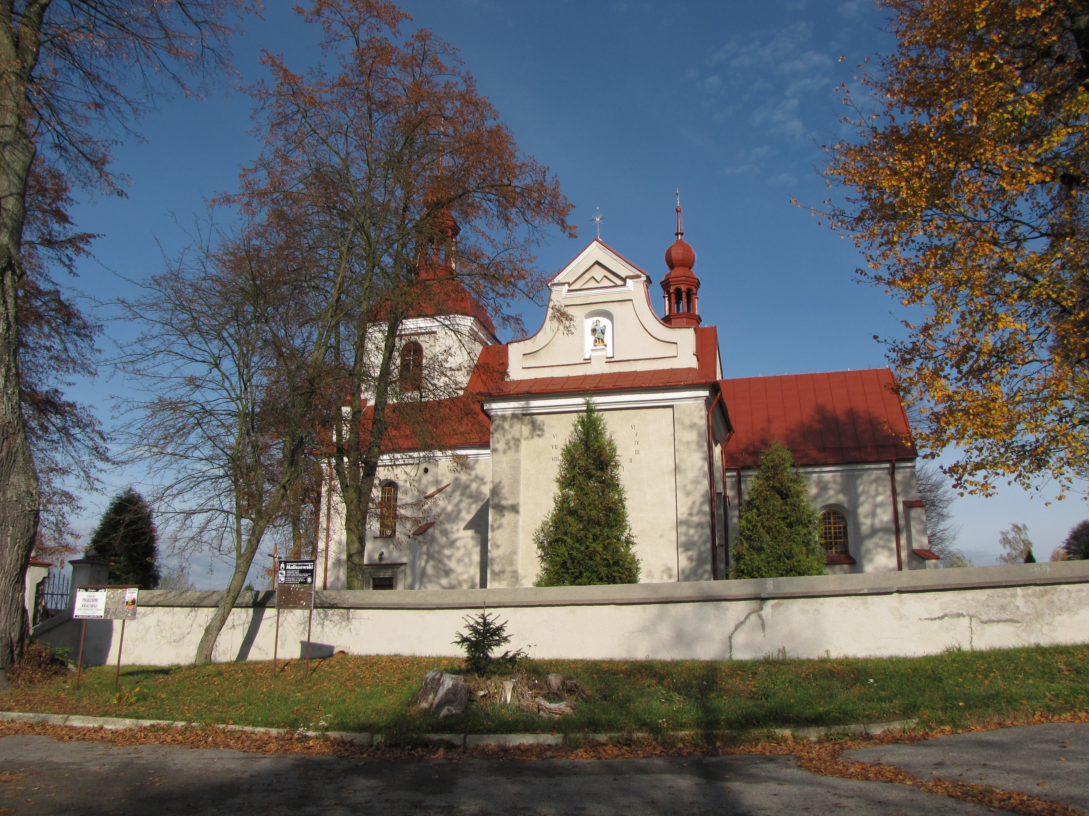 Stanowiska 55 - rzymskokatolicki kościół parafialny pw. św. Jakuba Apostoła, 1511, 1800